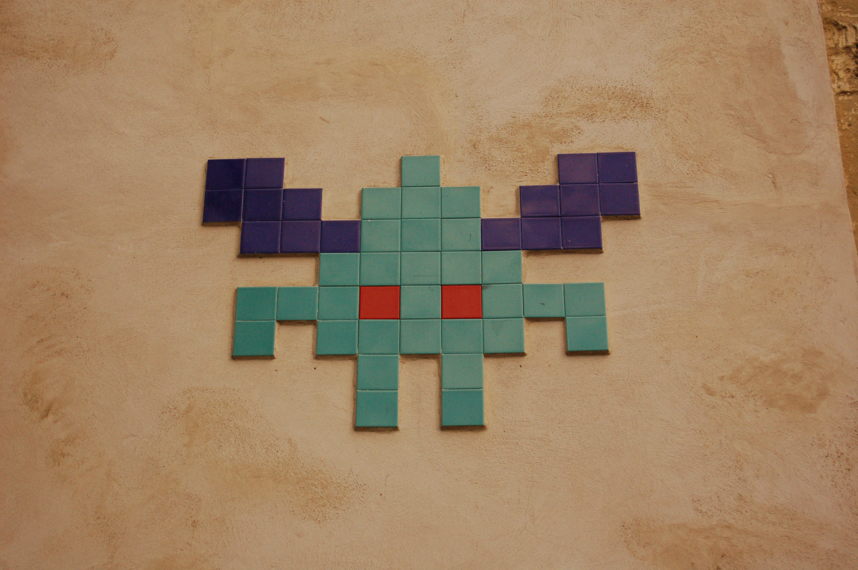 Space Invaders « PA_553 » à l'angle des 72 bis et 72 ter rue des Martyrs à Paris, France.